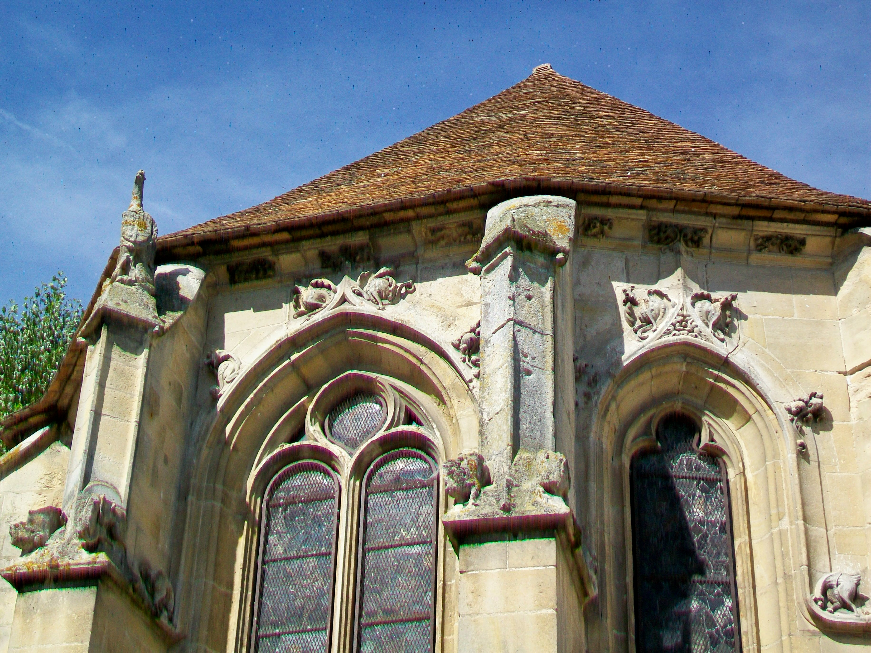 Parties supérieures des deux baies du chœur conservant la totalité de leur décoration Renaissance.